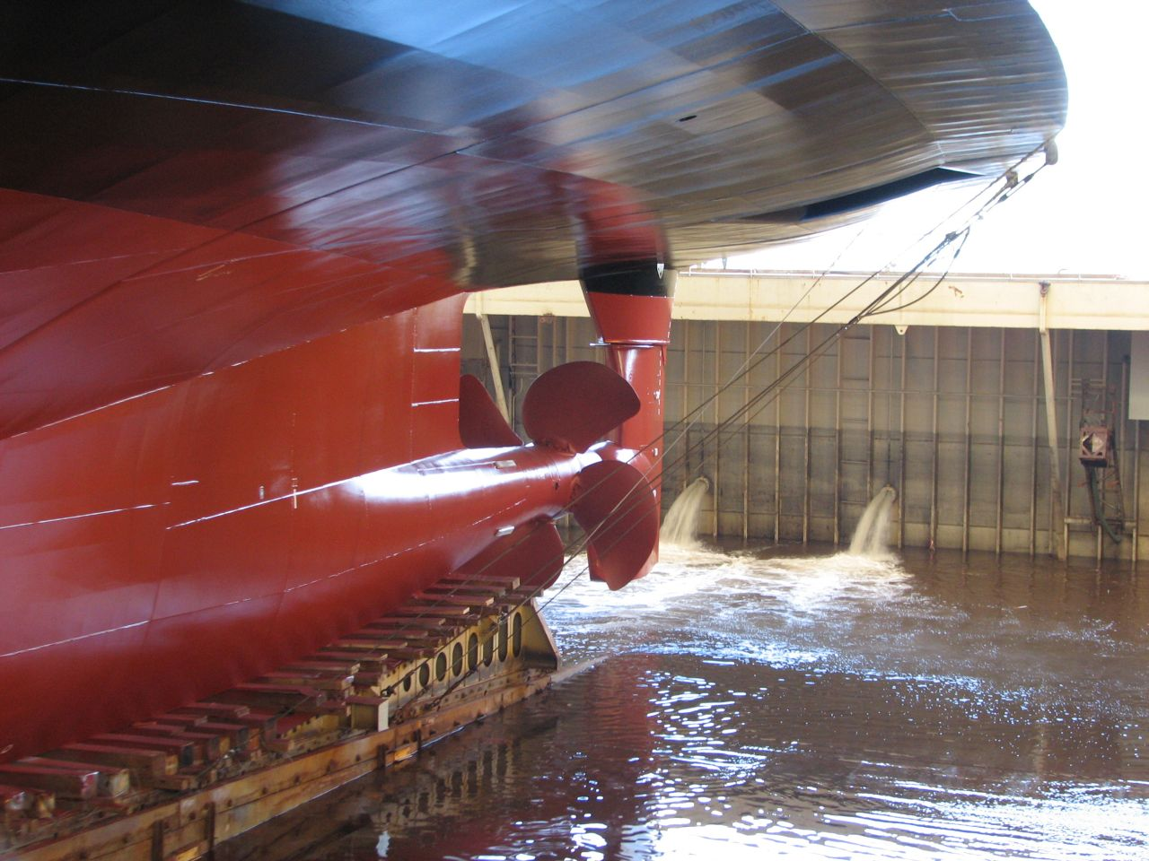 Flensburger Schiffbau Gesellschaft